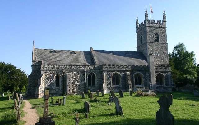 Horringer Church